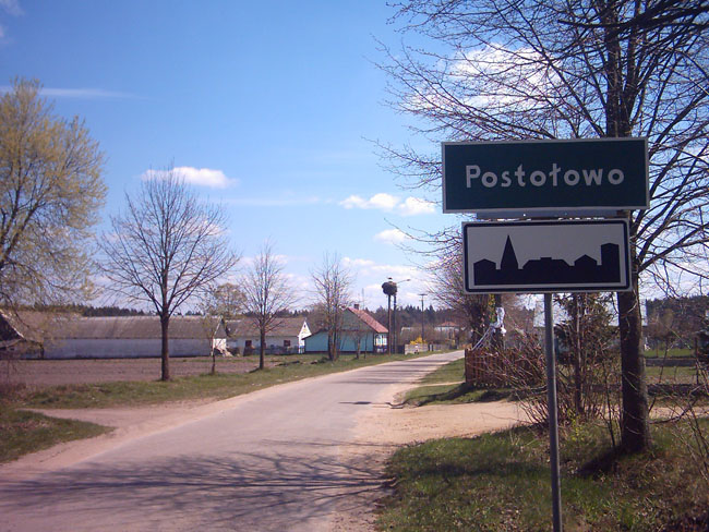 Postołowo – wieś w Polsce położona w województwie podlaskim, w powiecie hajnowskim, w gminie Hajnówka.